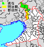 大阪府豊能郡の範囲